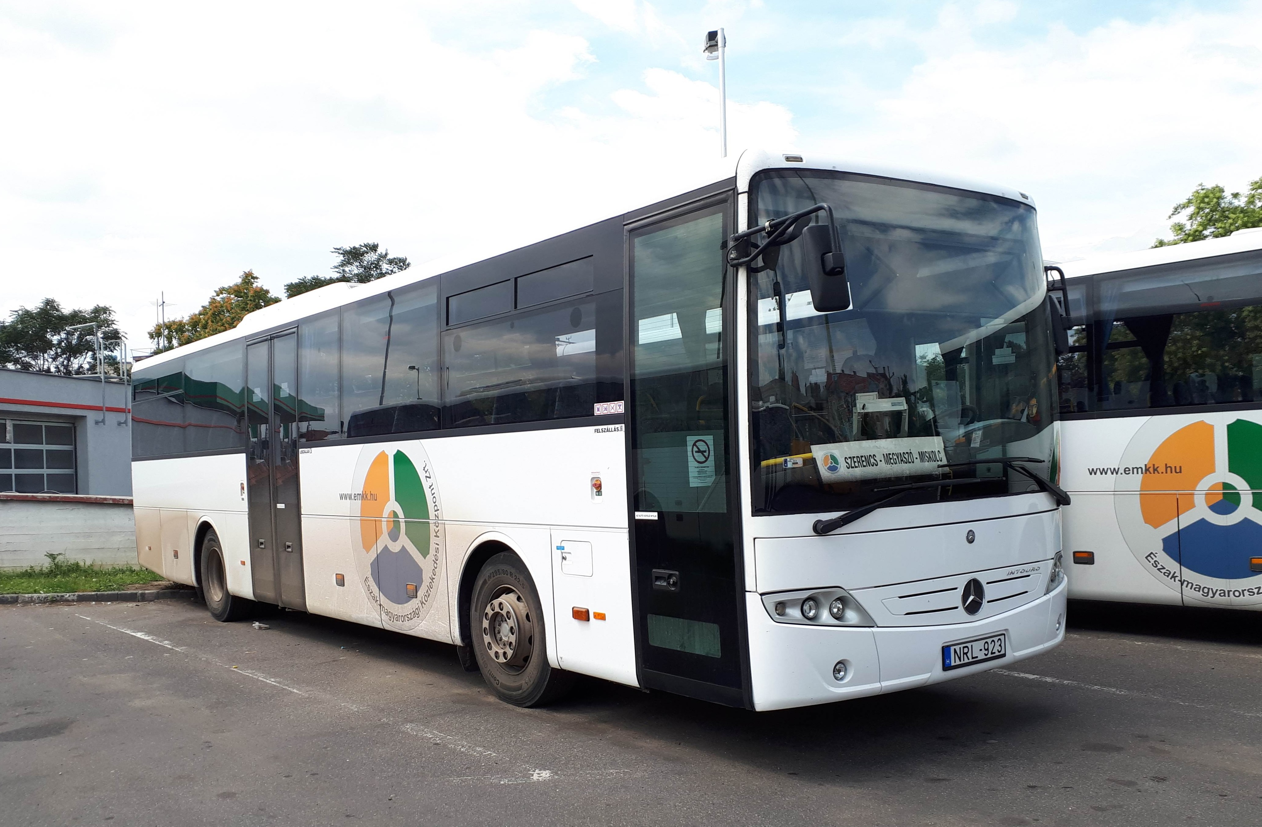 Az ÉMKK NRL-923-as rendszámú Mercedes Intouro busza Miskolcon, a 3730-as helyközi járaton.